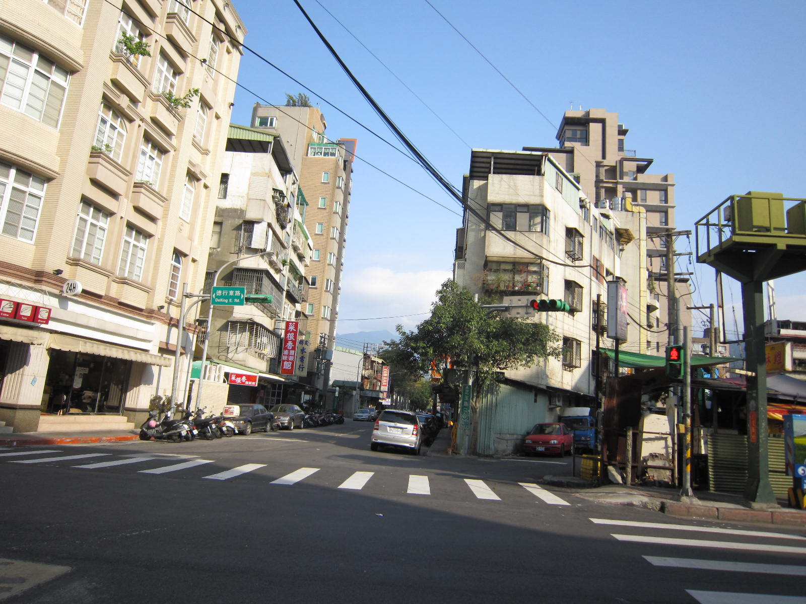 天母景點(台北市士林區德行東路與芝玉路1段與士東路200巷交叉路口)